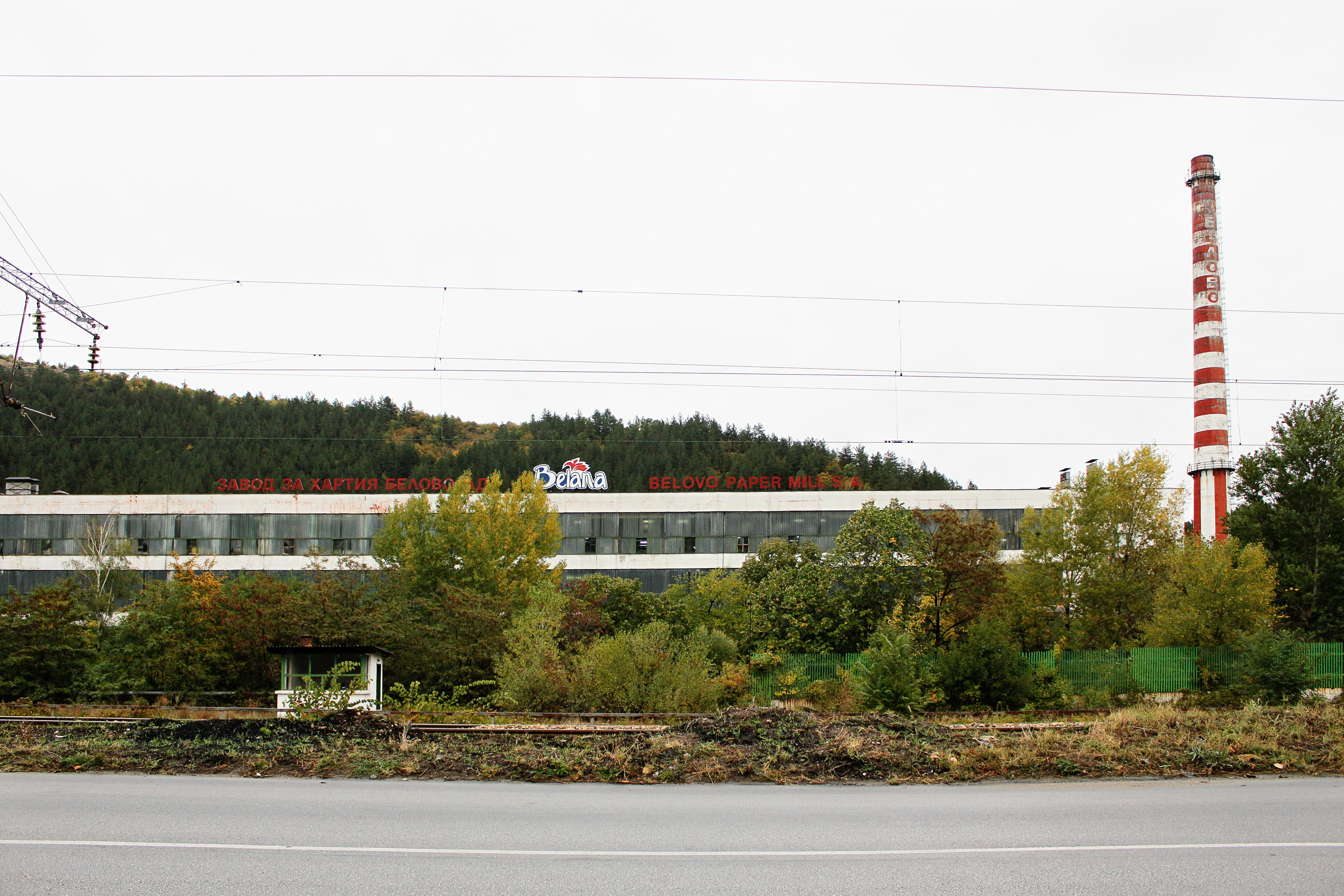 Belovo , Bulgarien